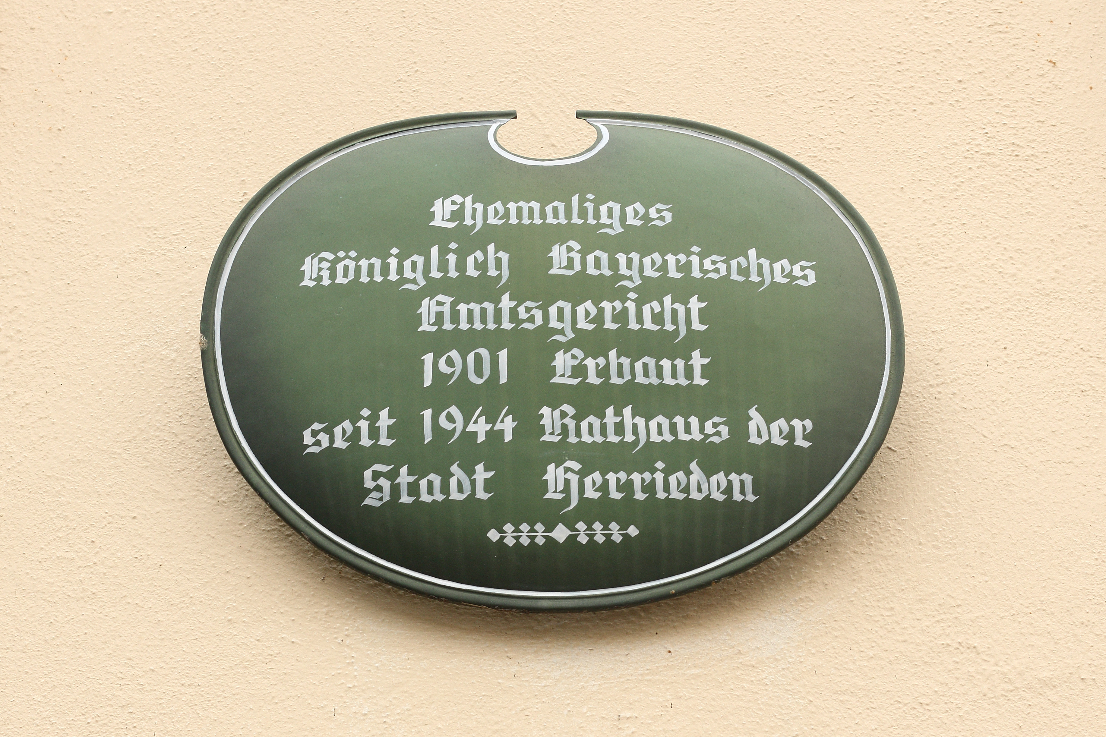 Herrieden - Herrnhof 10 - Ehem. Amtsgerichtsgebäude, Rathaus, zweigeschossiger Walmdachbau, mit Natursteingliederungen, Mittelrisalit mit Giebelaufsatz, neubarock, um 1900; zugehörig Stadtbefestigung